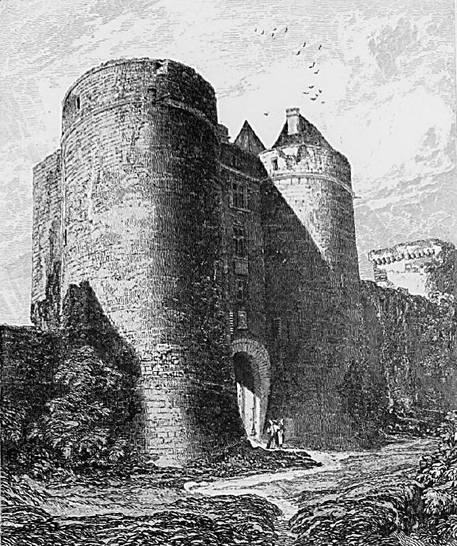 Château de Tancarville, Seine-Maritime, Haute-Normandie ; Source : dessin d'un ouvrage de la BNF, 1822, en anglais ; Références dans l'ouvrage : volume II, planche 186, page 103. [Illustrations de Architectural Antiquities of Normandy] [Image fixe numérisée] / J.S. Cotman, dess. et aut. du texte. Publication : Londres : J. et A. Arch. Cornhill, 1822. Description matérielle : 100 est. : taille-douce et burin : n. et b. ; 50 x 35 cm et moins. Dans Architectural Antiquities of Normandy, par John Sell Cotman, Londres, J. et A. Arch. Cornhill, 1822. L'ouvrage comprend 100 planches et 3 figures, toutes reproduites en 100 images numérisées d'après le microfilm R 122038. Paris. BNF (Magasin central des Imprimés). Gr Fol Lj5 71. Notice n° : FRBNF38497773.